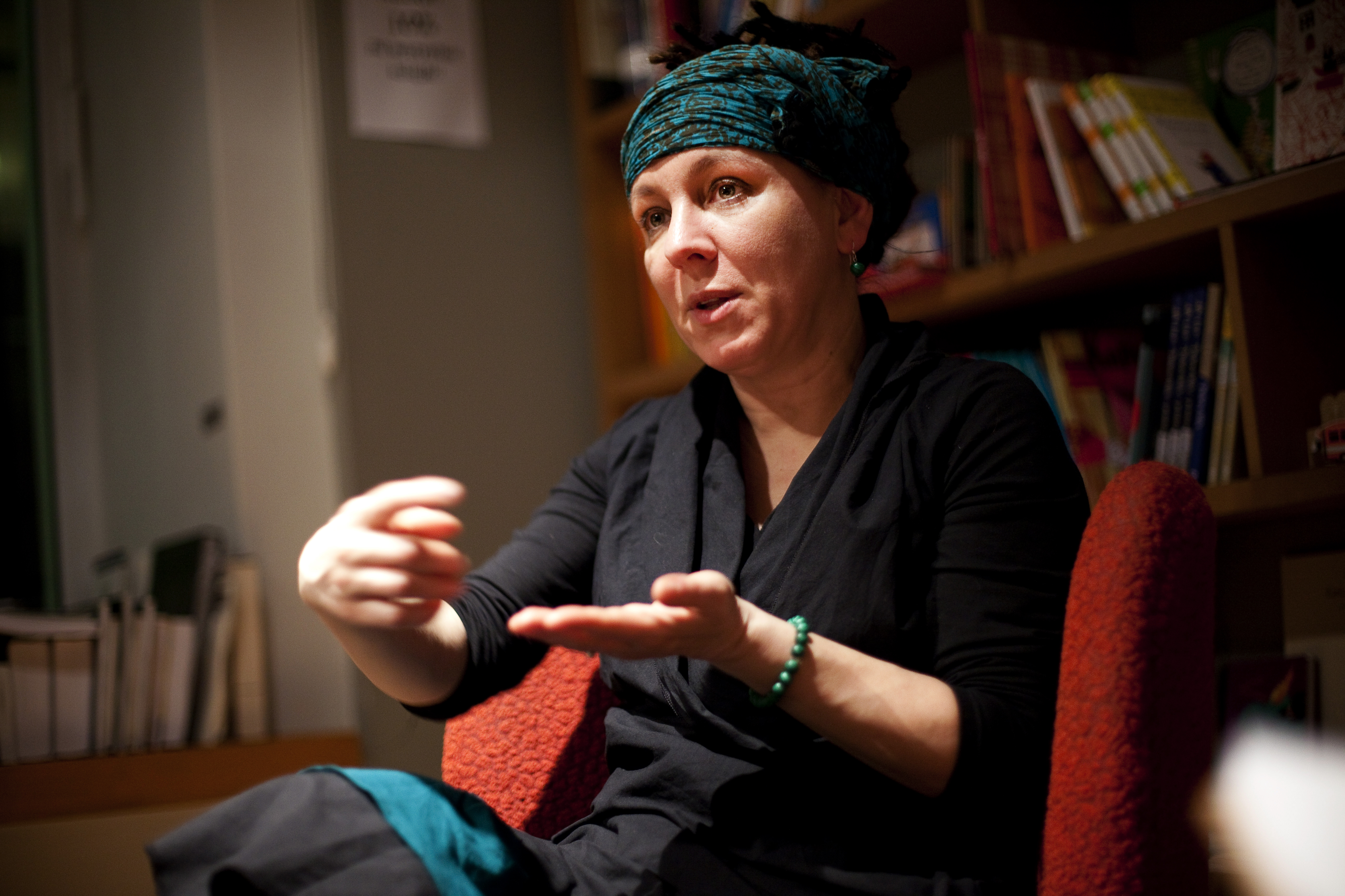 Wroclaw Kawiarnia Falanster spotkanie z pisarką Olgą Tokarczuk promujące książkę “Prowadź swój plug przez kości umarłych” foto Borys Nieśpielak / DeFacto